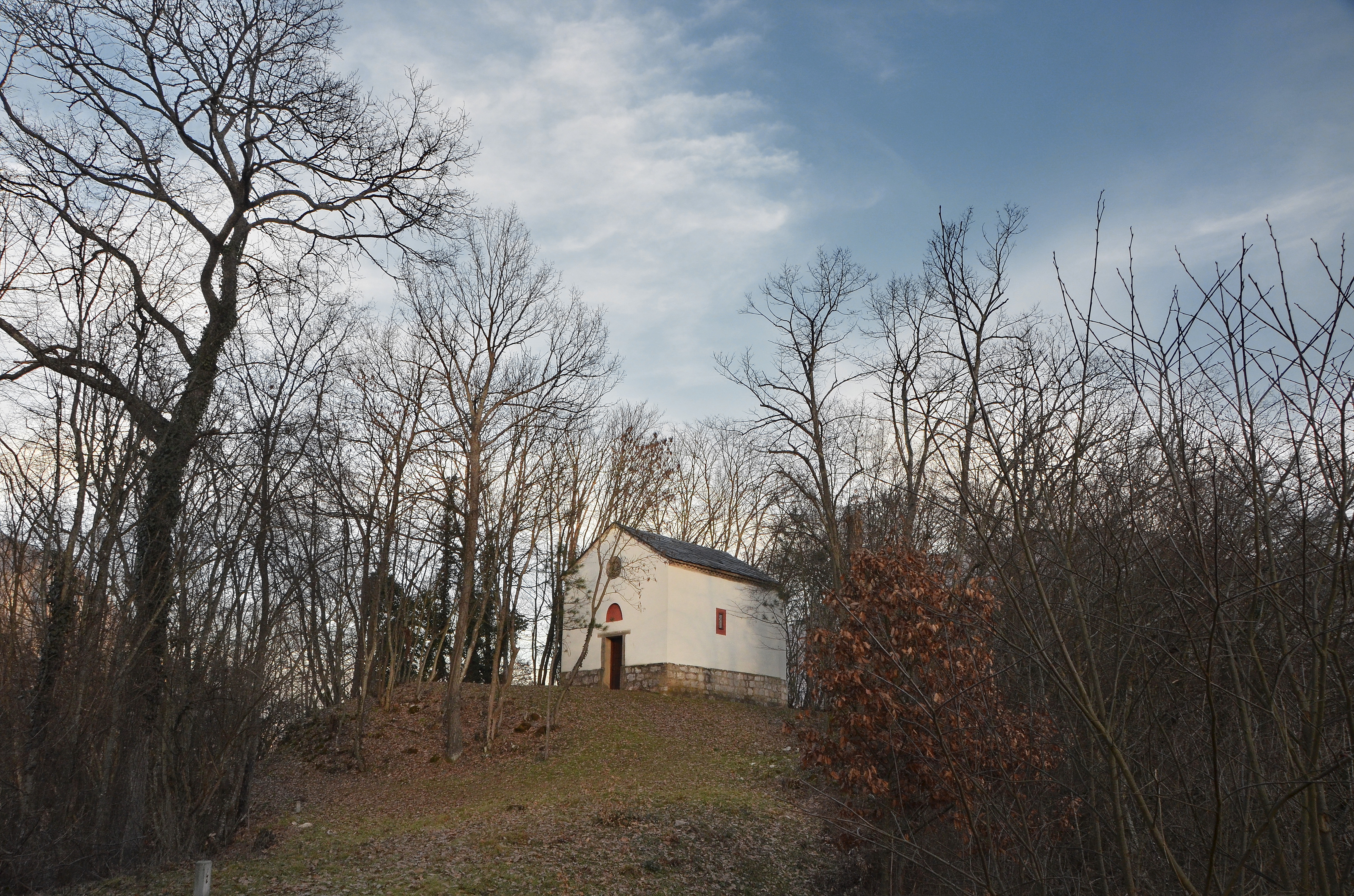 Манастир Илиње (Кабларско) налази се у Овчар Бањи, на брду изнад манастира Благовештења.